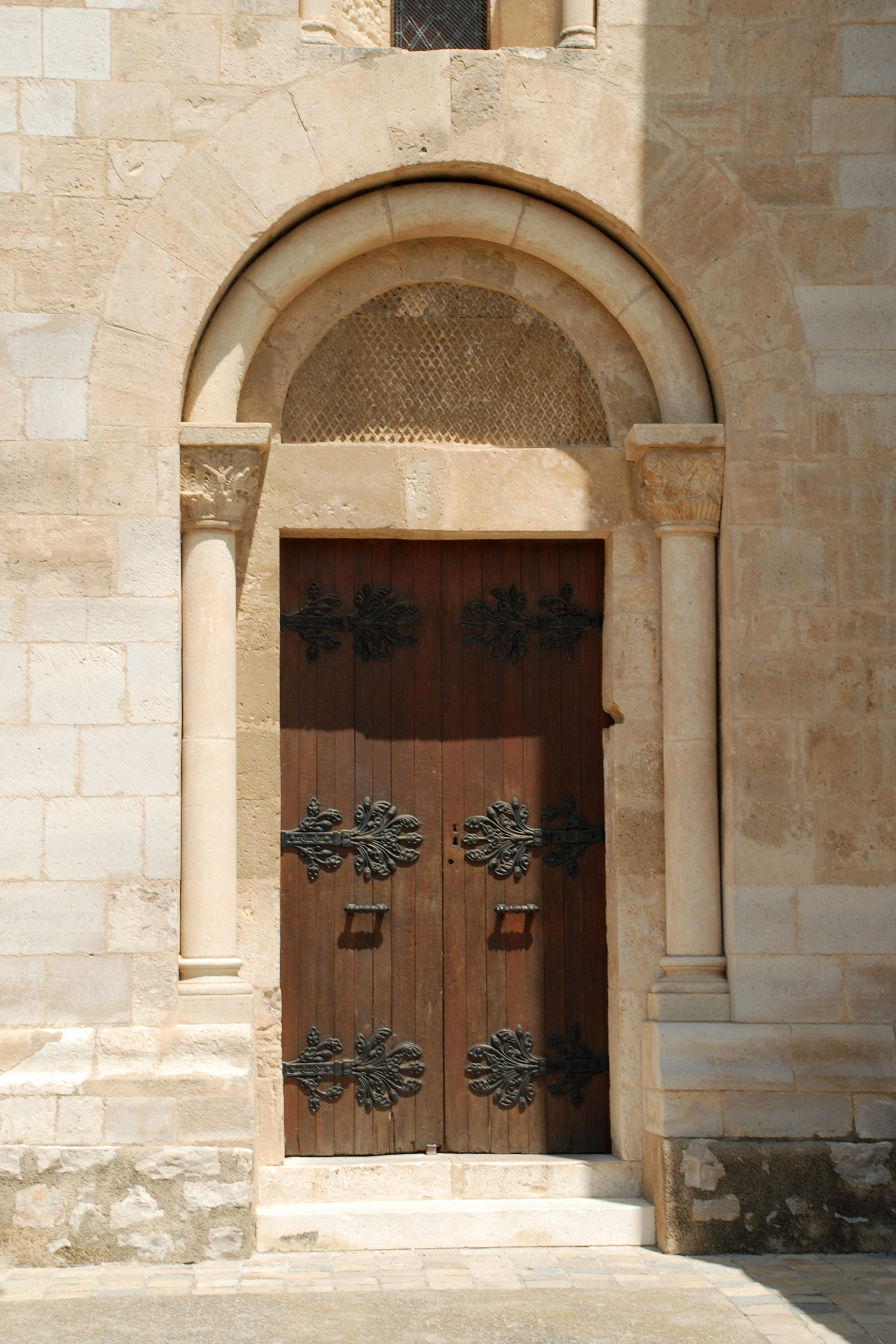 France - Languedoc - Hérault - Église Saint-Martial d'Assas